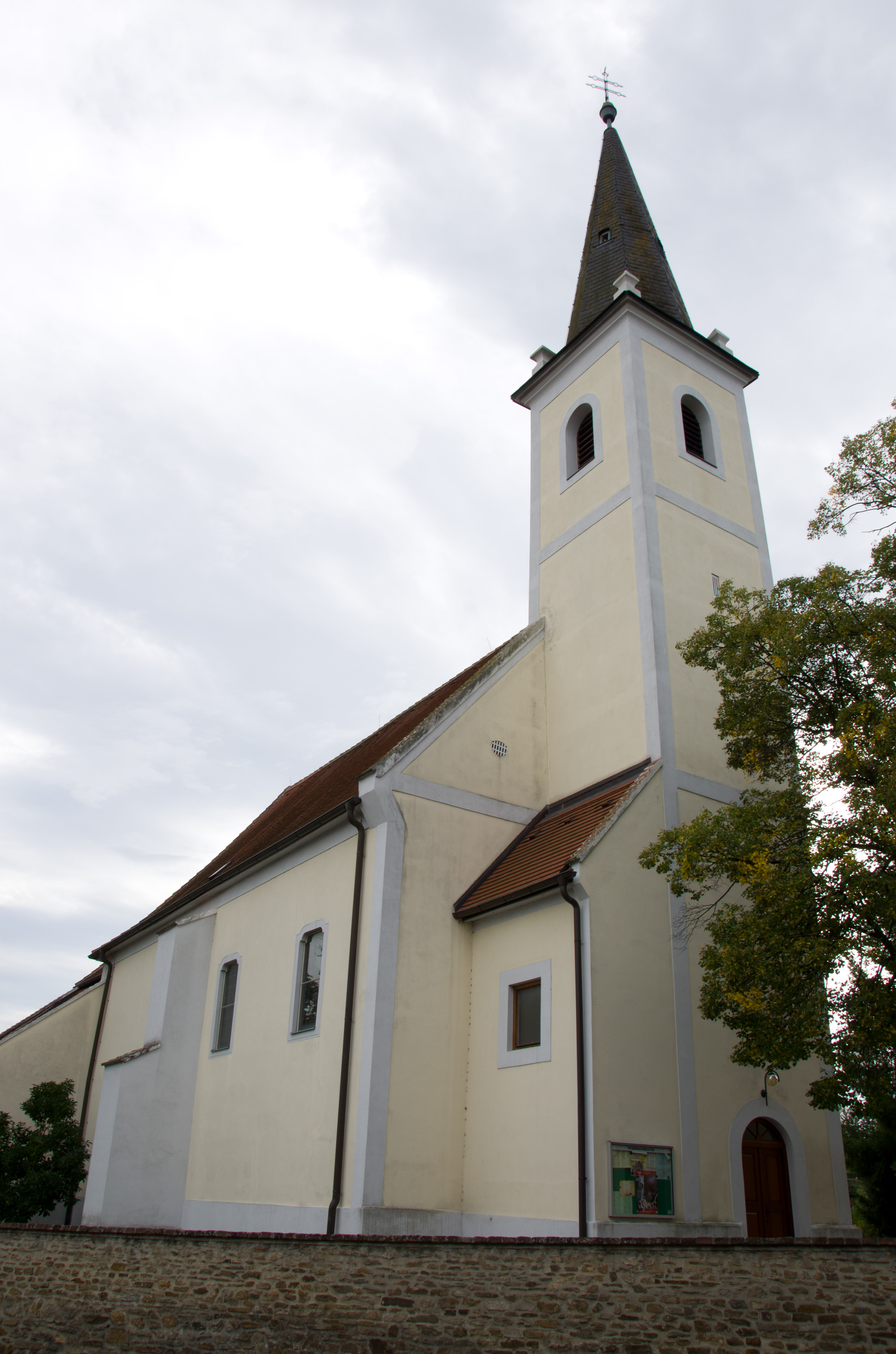 Kath. Pfarrkirche Hl. Dreifaltigkeit und ehem. Friedhof